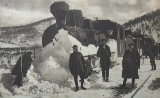 Verschneiter Zug auf der Steinbeisbahn Prijedor–Knin